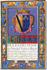 Documento de 1611 en el que Felipe III otorga a Cristóbal Gómez de Sandoval, Primer Duque de Uceda, las alcabalas de Uceda y los lugares de su jurisdicción.